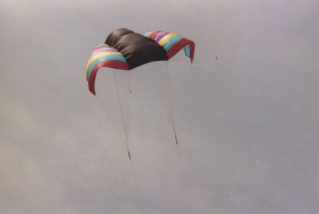 ein Drachen von Marian Szengel